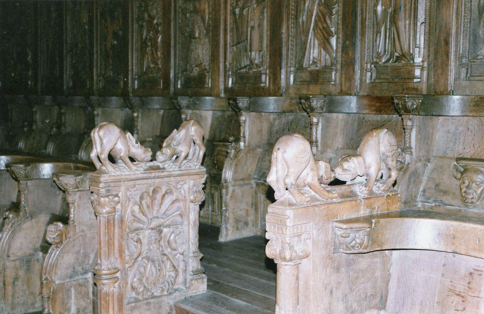 Stalles du début du XVIème siècle à l'église Sainte-Marie de Bourg-en-Bresse (Ain, région Rhône-Alpes, France, 2004)